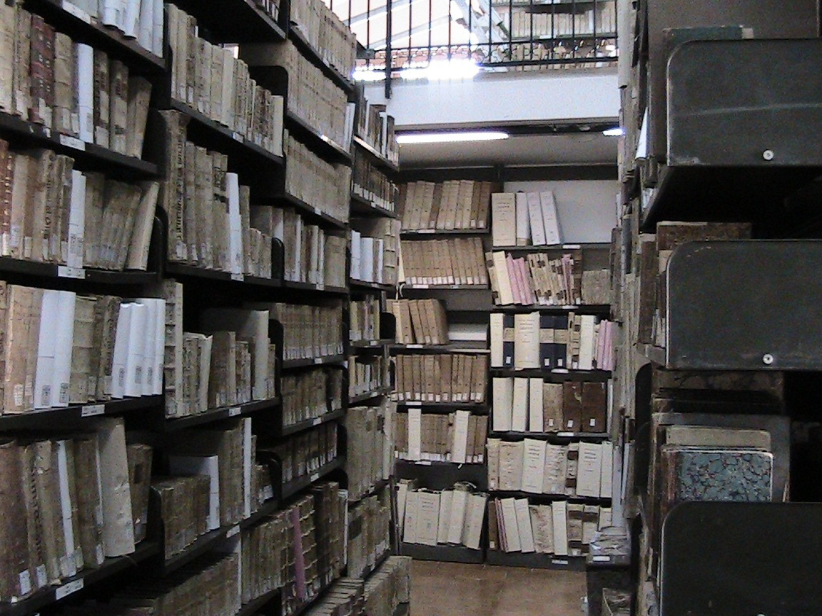 Magazinbereich der Biblioteca Liciniana, Termini Imerese